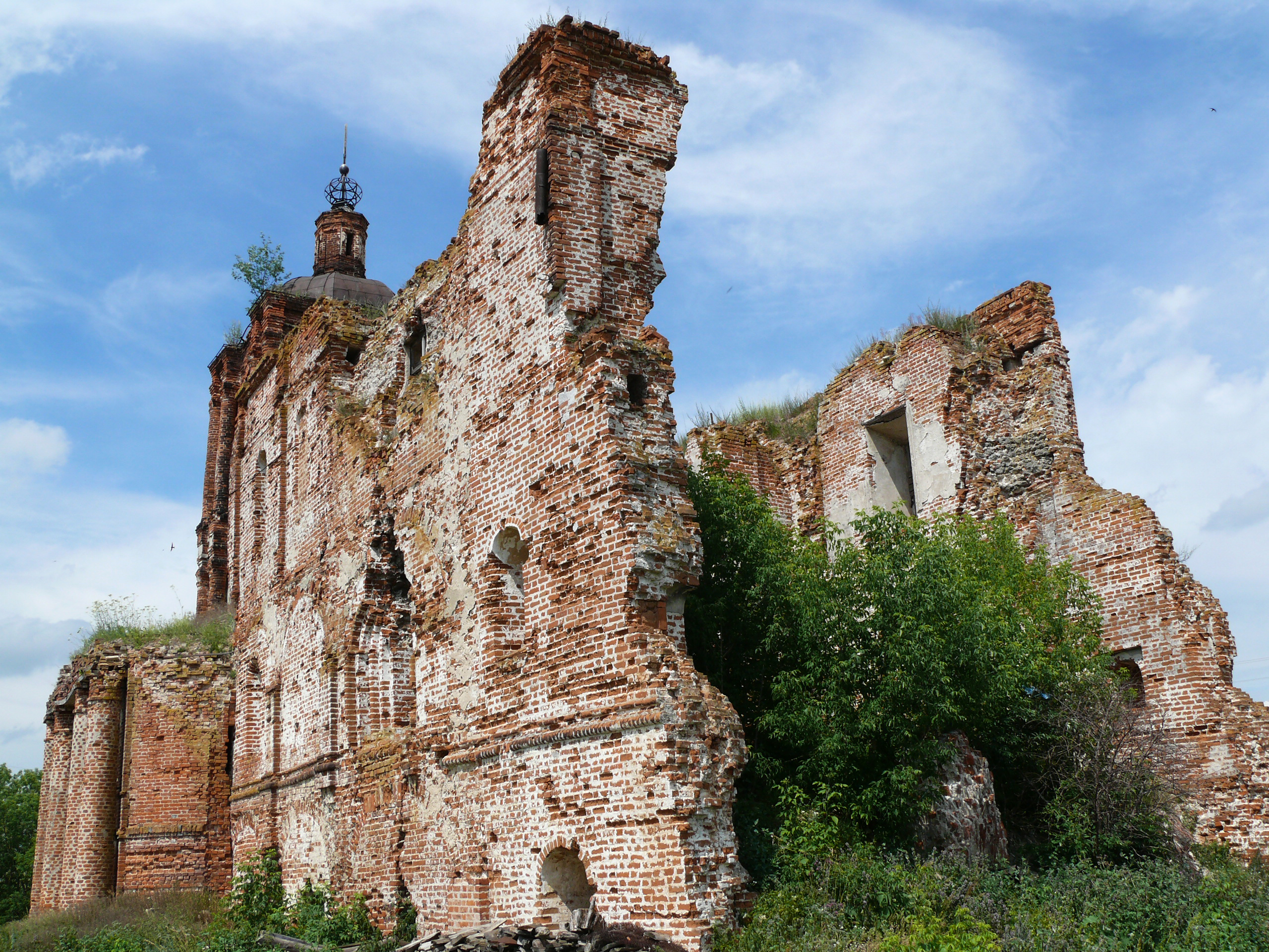 Собор Успения Пресвятой Богородицы: Федеративная ул., Перемышль, Перемышльский район, Калужская область